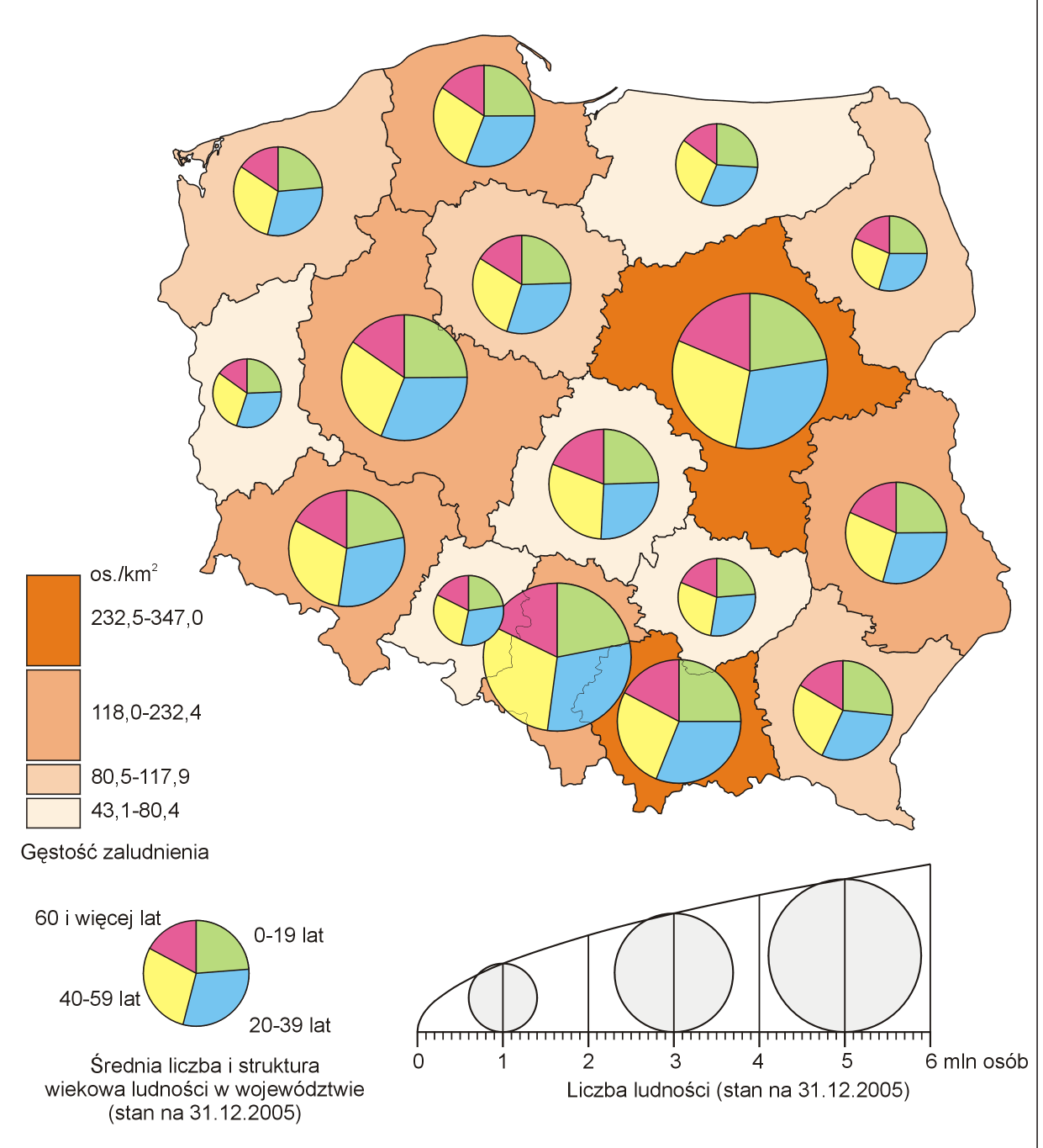 Kartodiagram sumaryczno-strukturalny